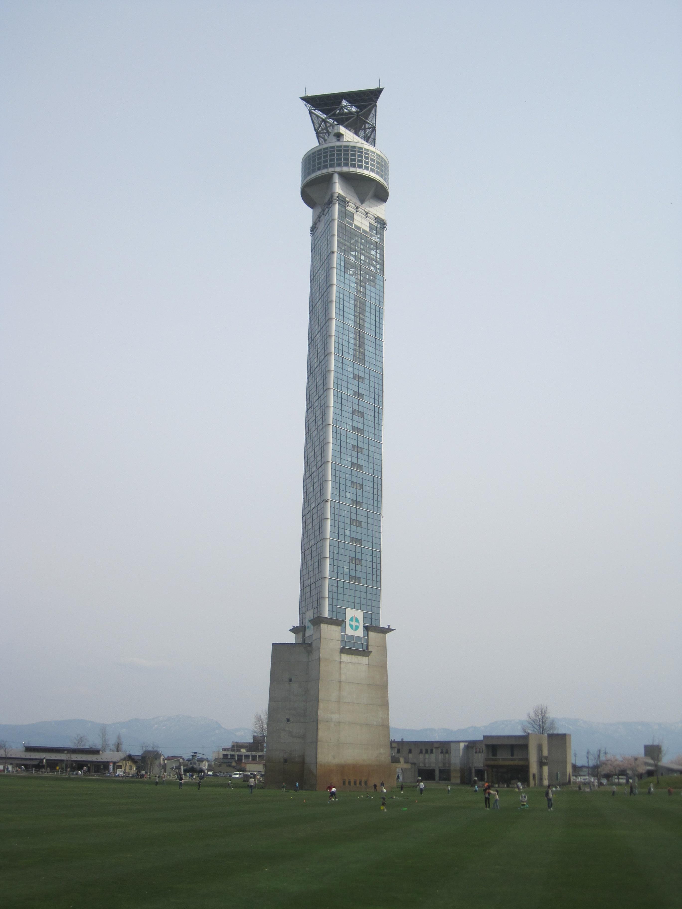 クロスランドおやべ（富山県小矢部市）にある「クロスランドタワー」。タワーの高さは118mを有する。